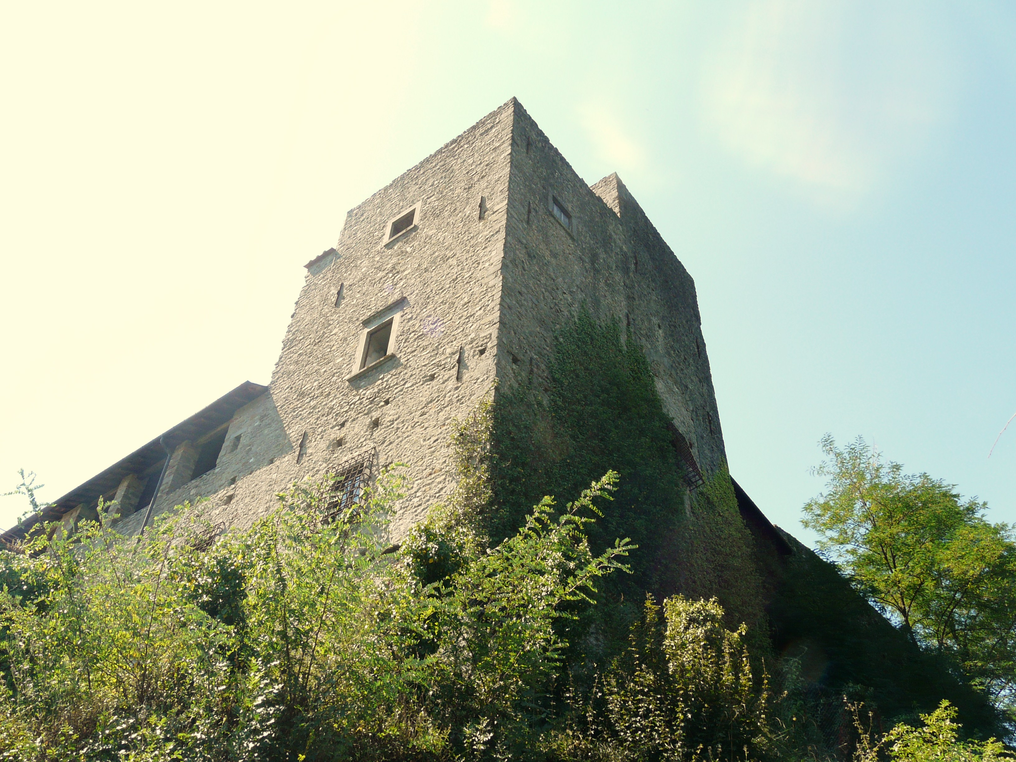 Immagini del borgo di Lusuolo, Mulazzo, Toscana, Italia